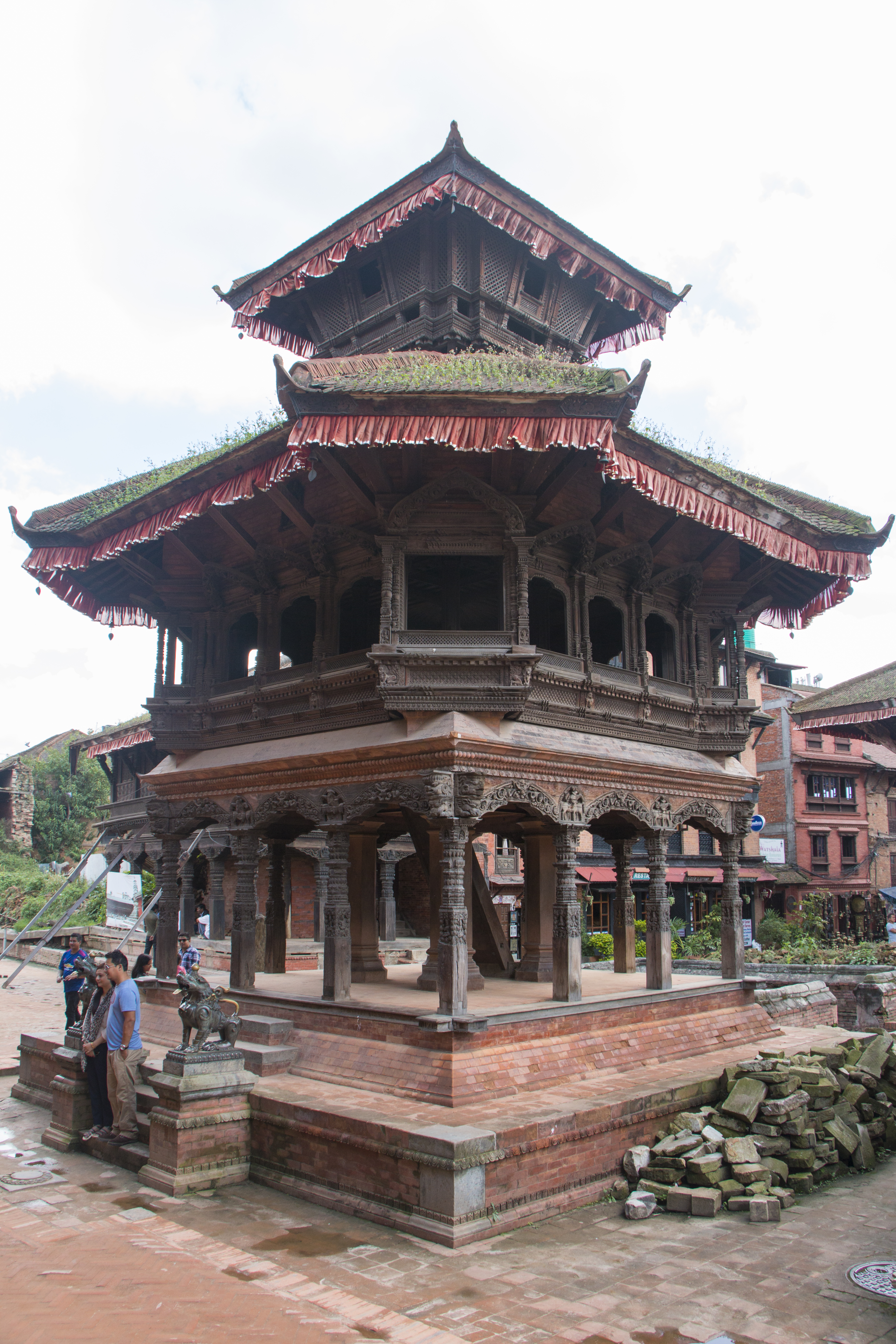 Chyasilin Mandap.